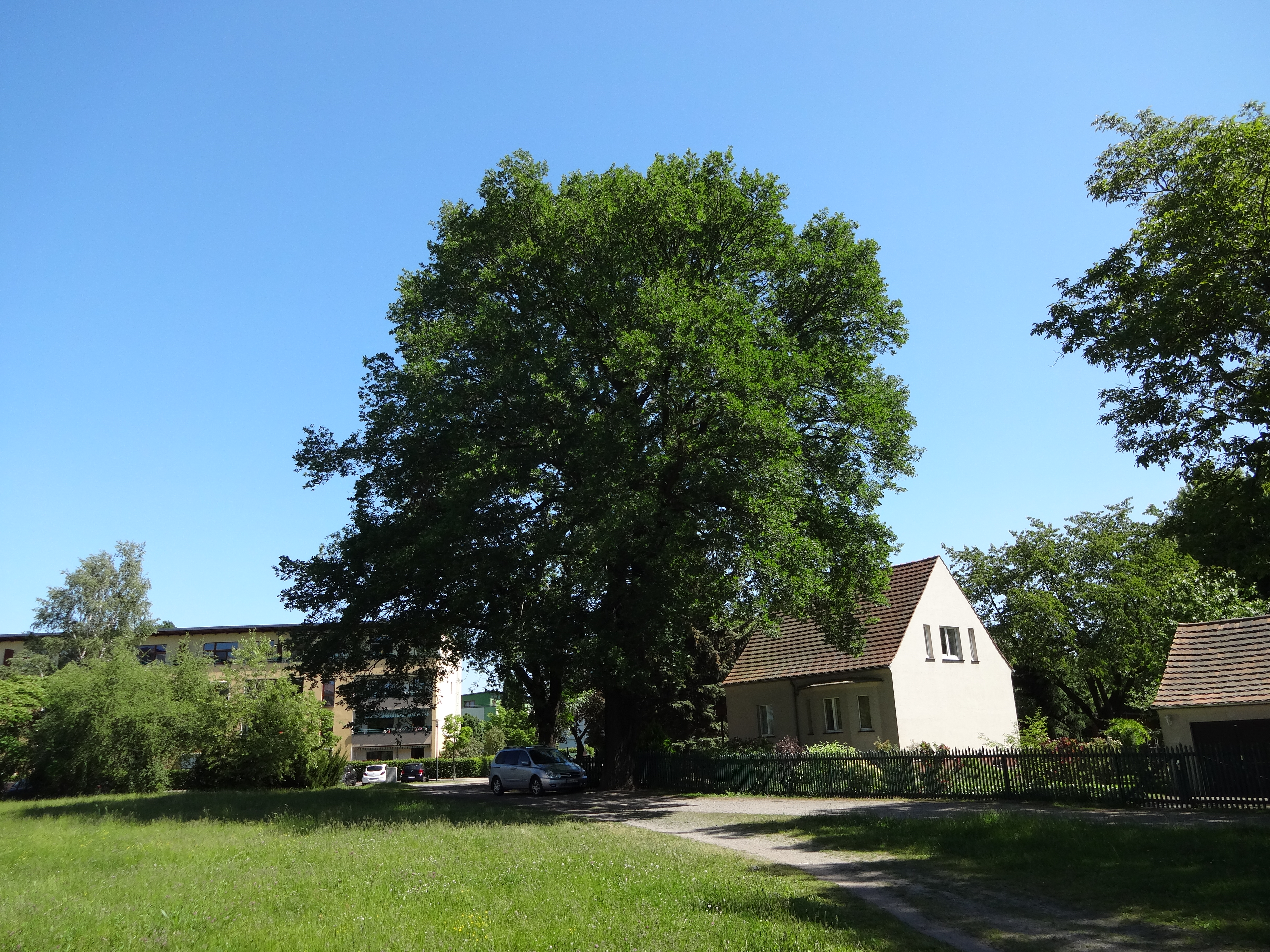 Naturdenkmal Stieleiche vor dem Grundstück Kormoranstraße 13 in Senftenberg